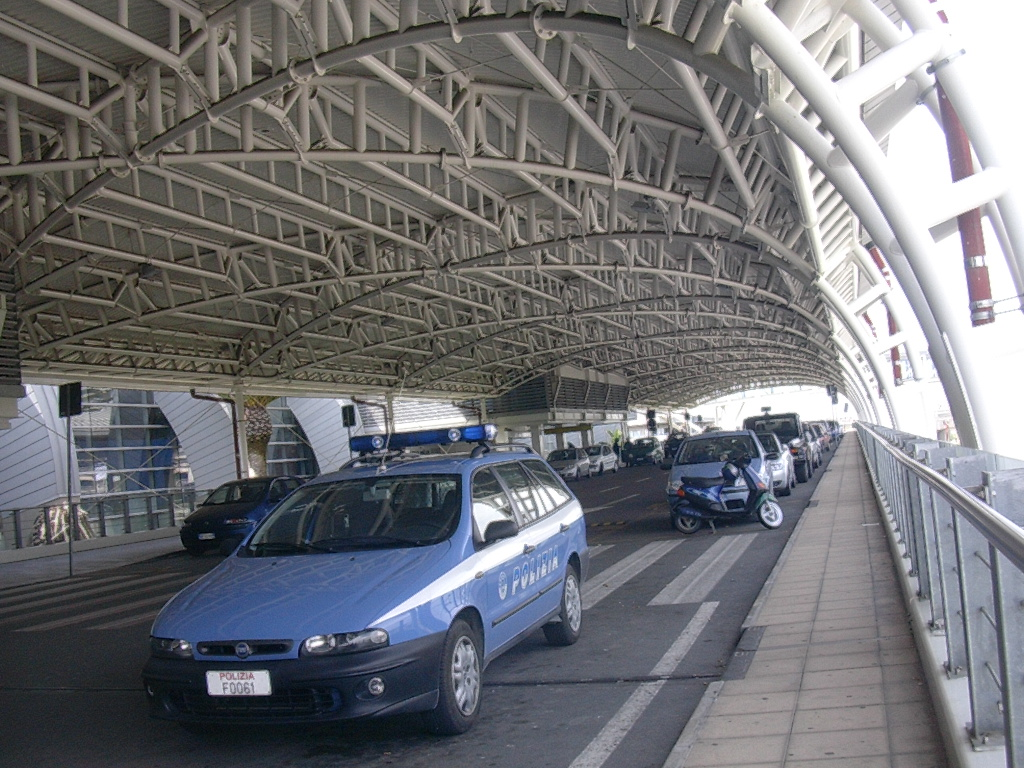 Esterno della Zona Partenze dell'aeroporto di Cagliari, Foto Personale